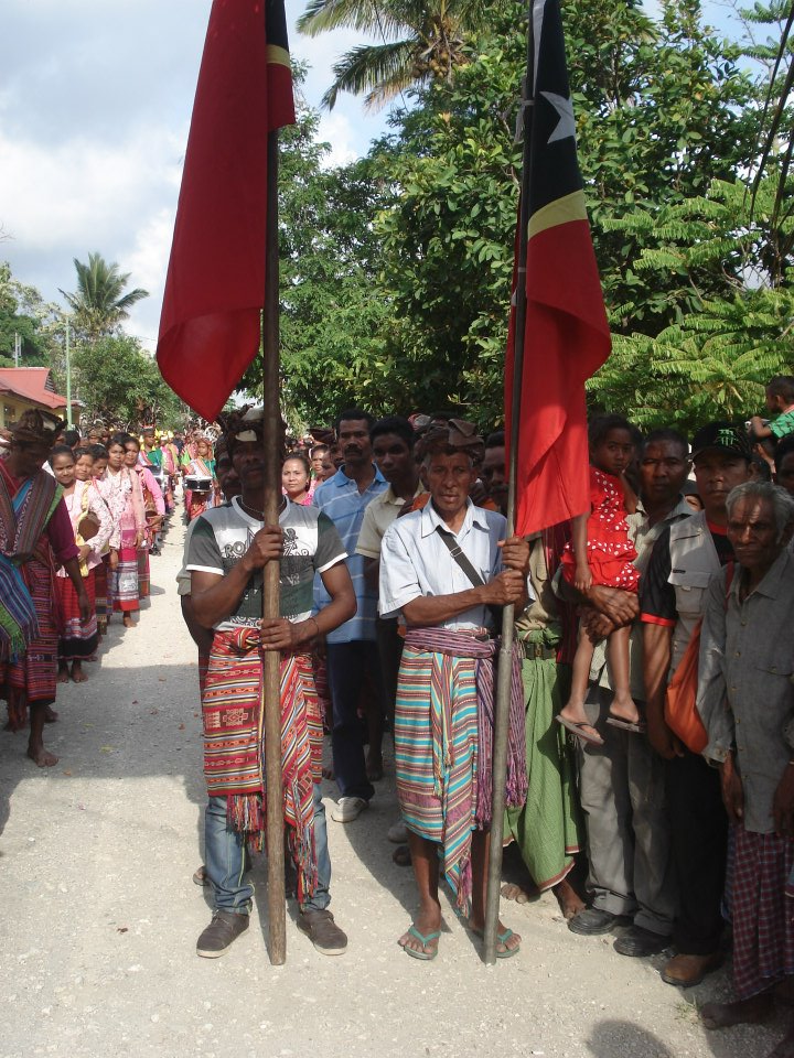 Fohoren